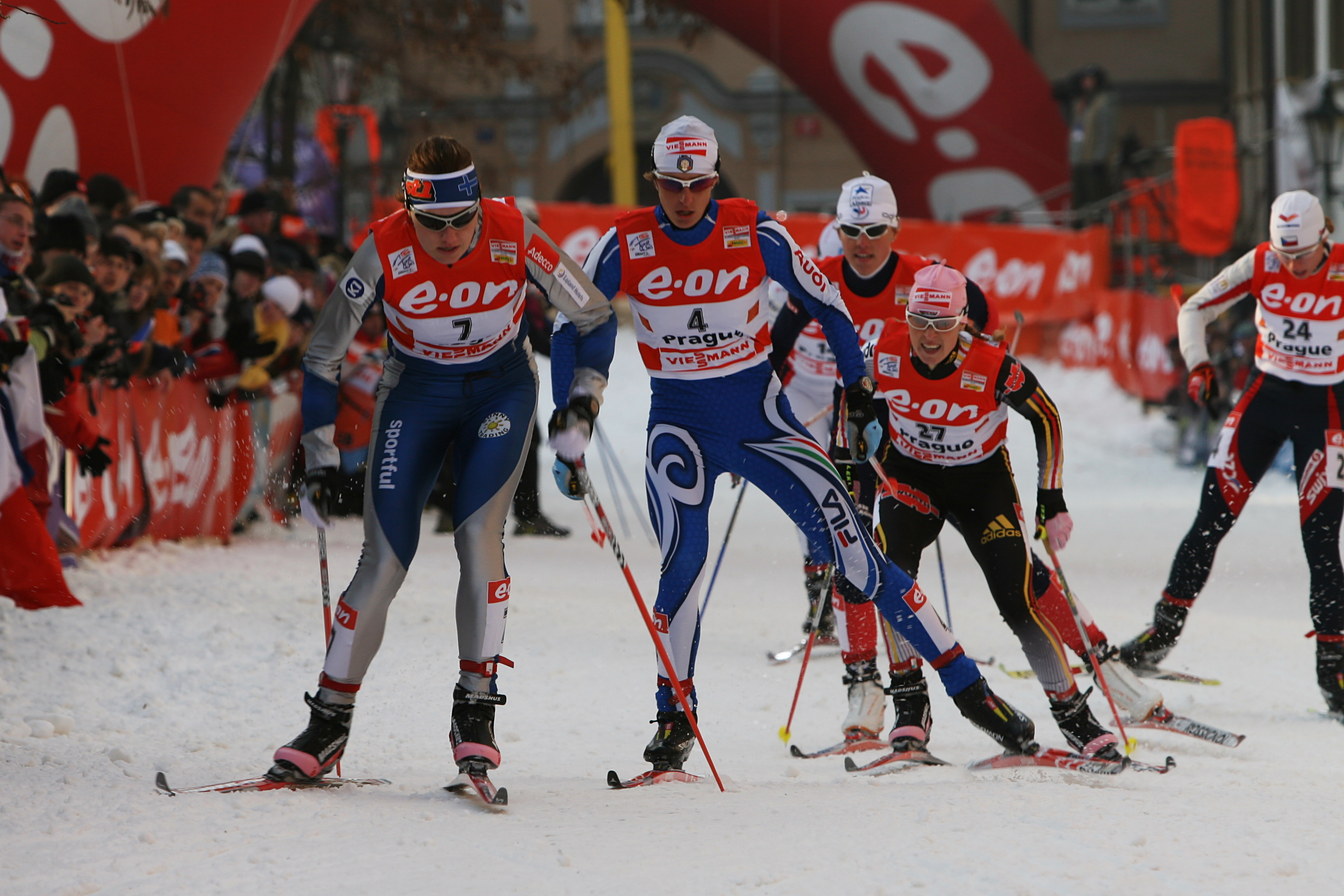 Magda Genuin #4 behind Pirjo Muranen #7, Evi Sachenbacher-Stehle #27 in the quaterfinals of Tour de Ski in Prague